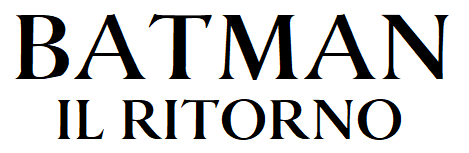 Reproduction created by me of the Italian Batman Returns logo